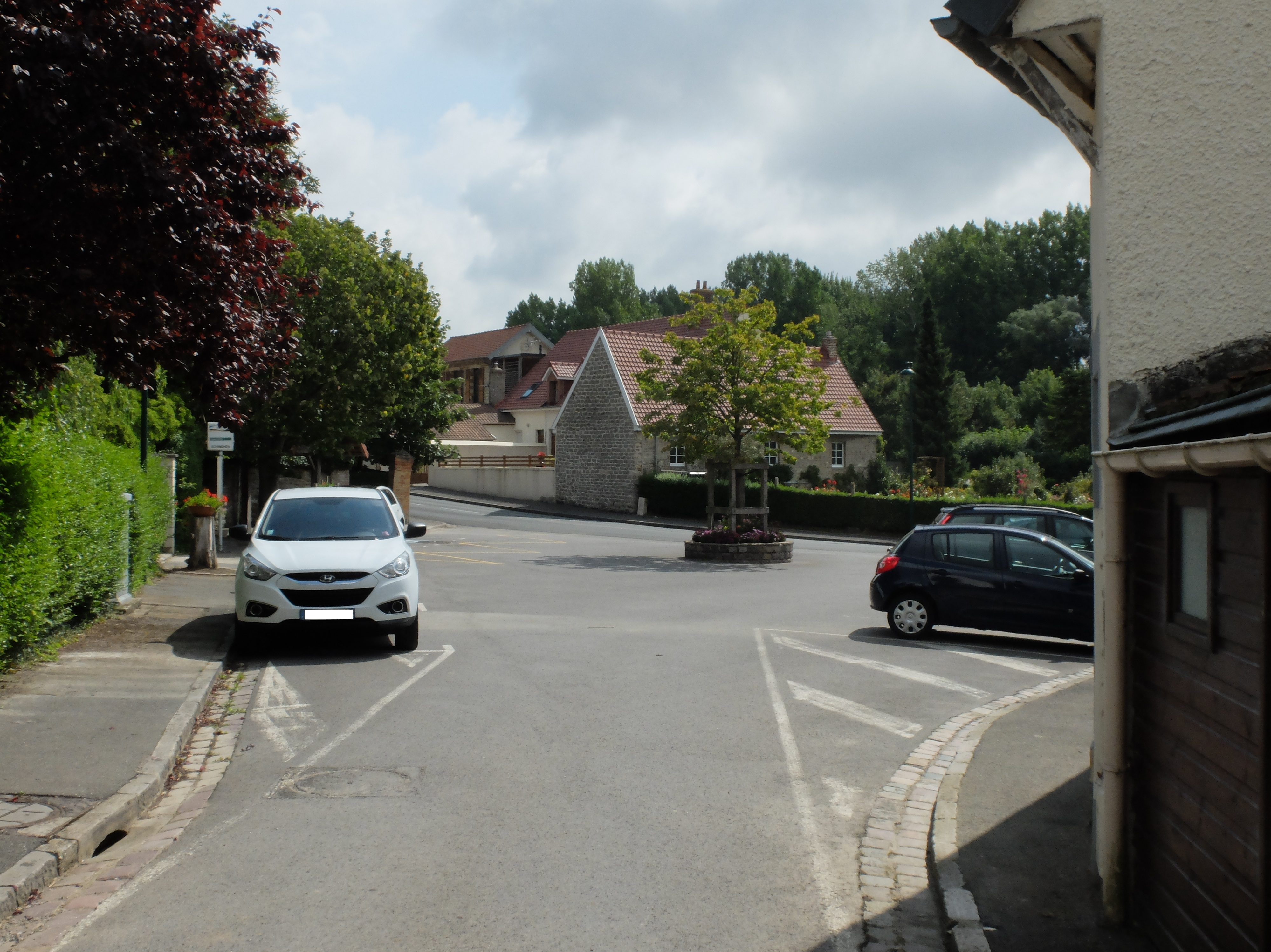 Vue de la place d'Echinghen.